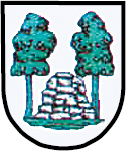 Herb Kamieńca (gmina Zbrosławice, powiat tarnogórski, województwo śląskie, Polska)